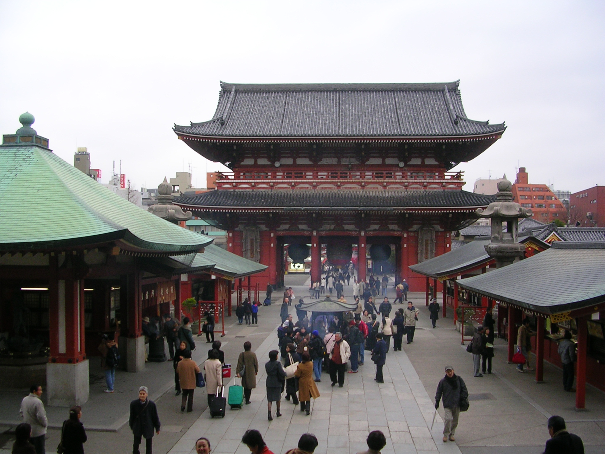 Sensoji, Asakusa, Taito-ku, Tokyo